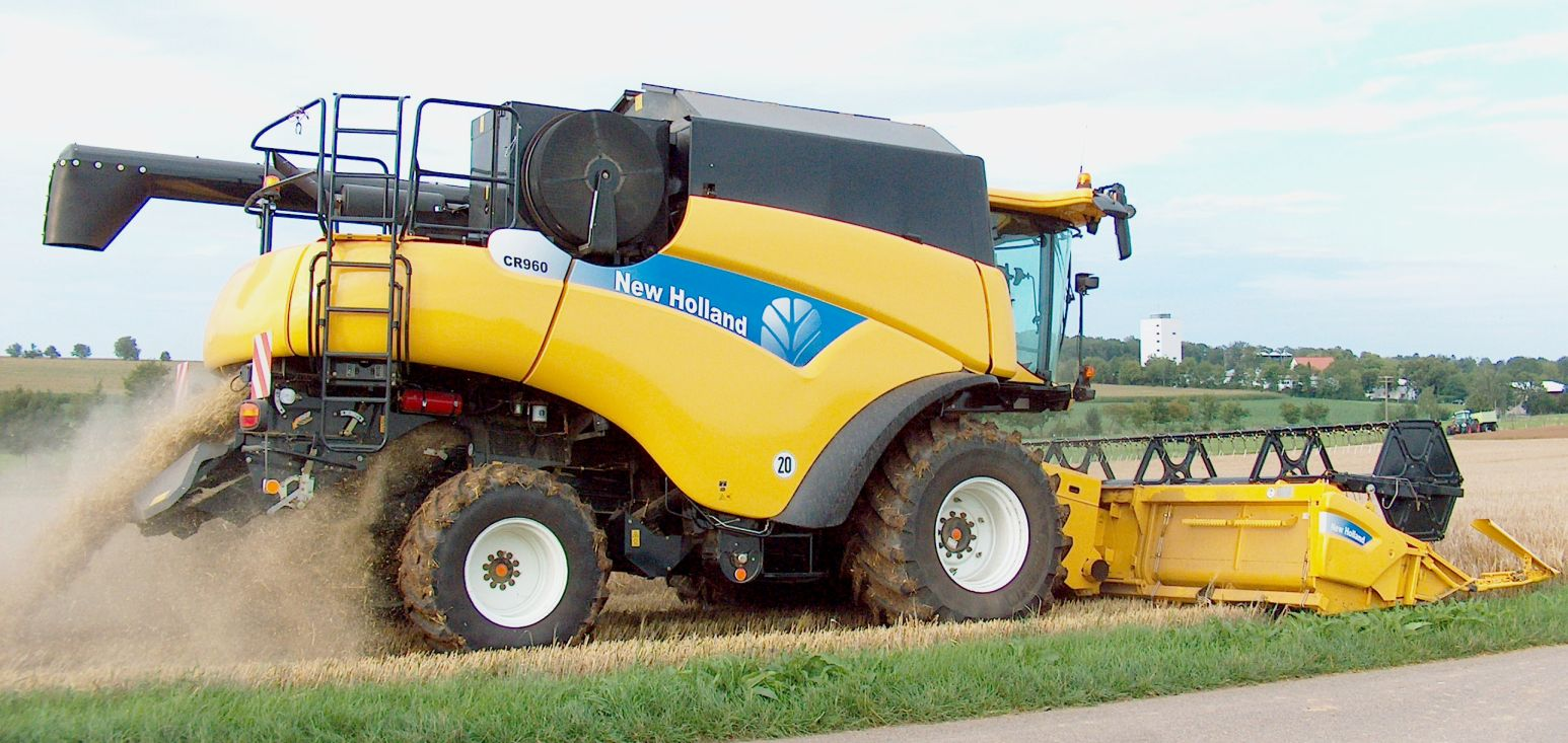 New-Holland-Mähdrescher CR 960 mit eingeschalteten Häcksler bei der Ernte von Gerste.